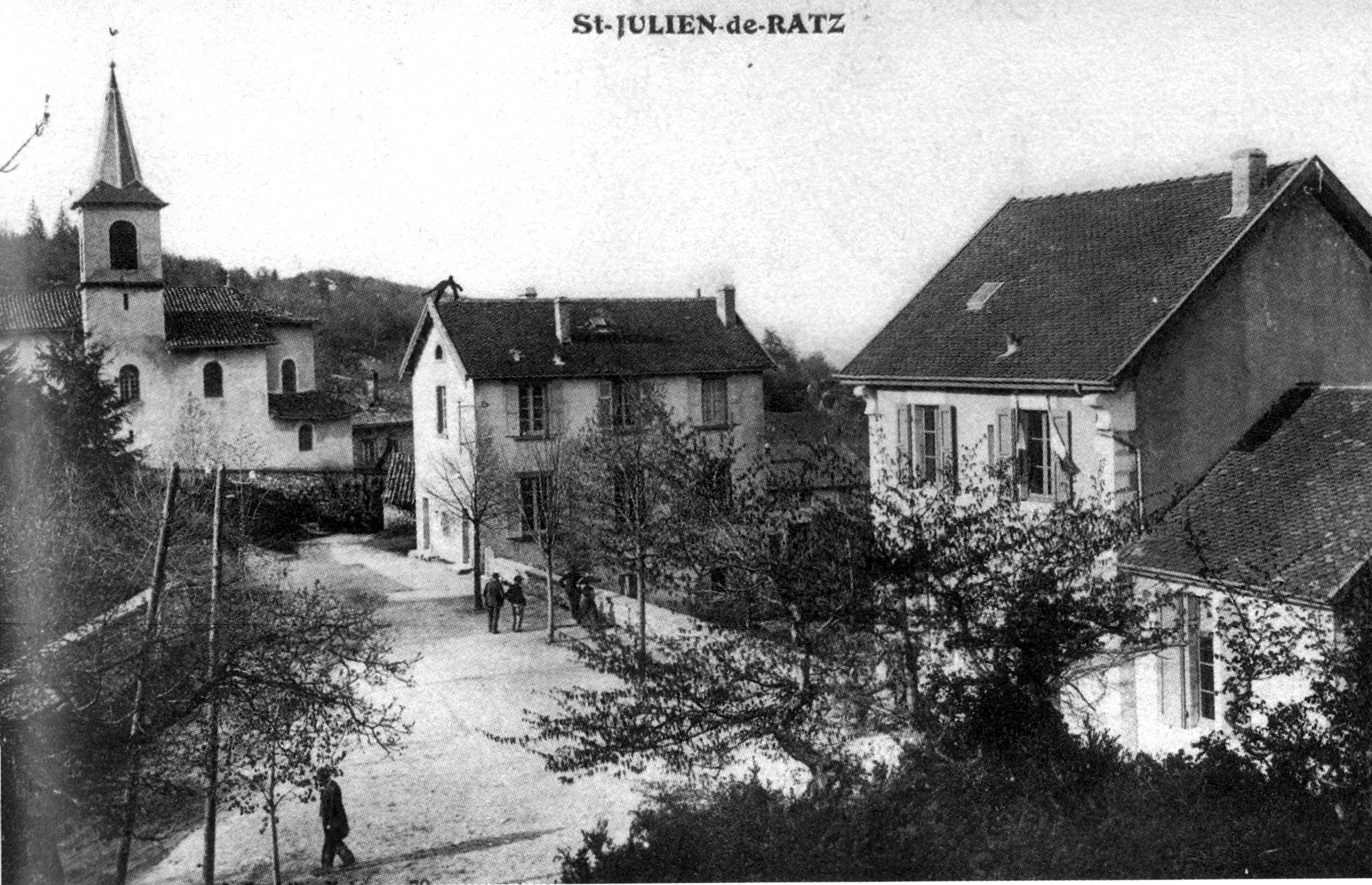 Saint-Julien-de-Raz, en 1906